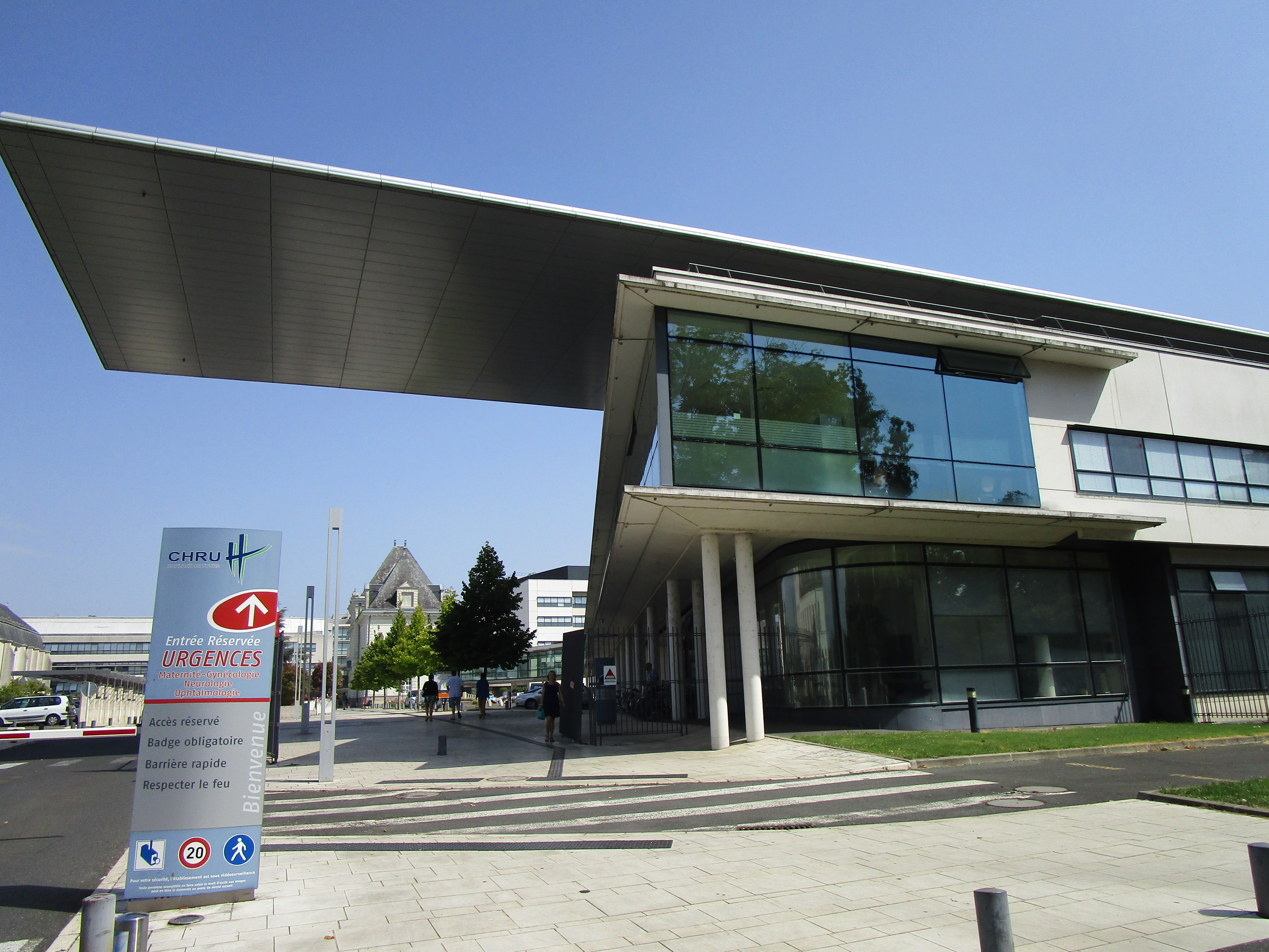 Entrée du site de l’hôpital Bretonneau de Tours, depuis le boulevard Tonnellé.